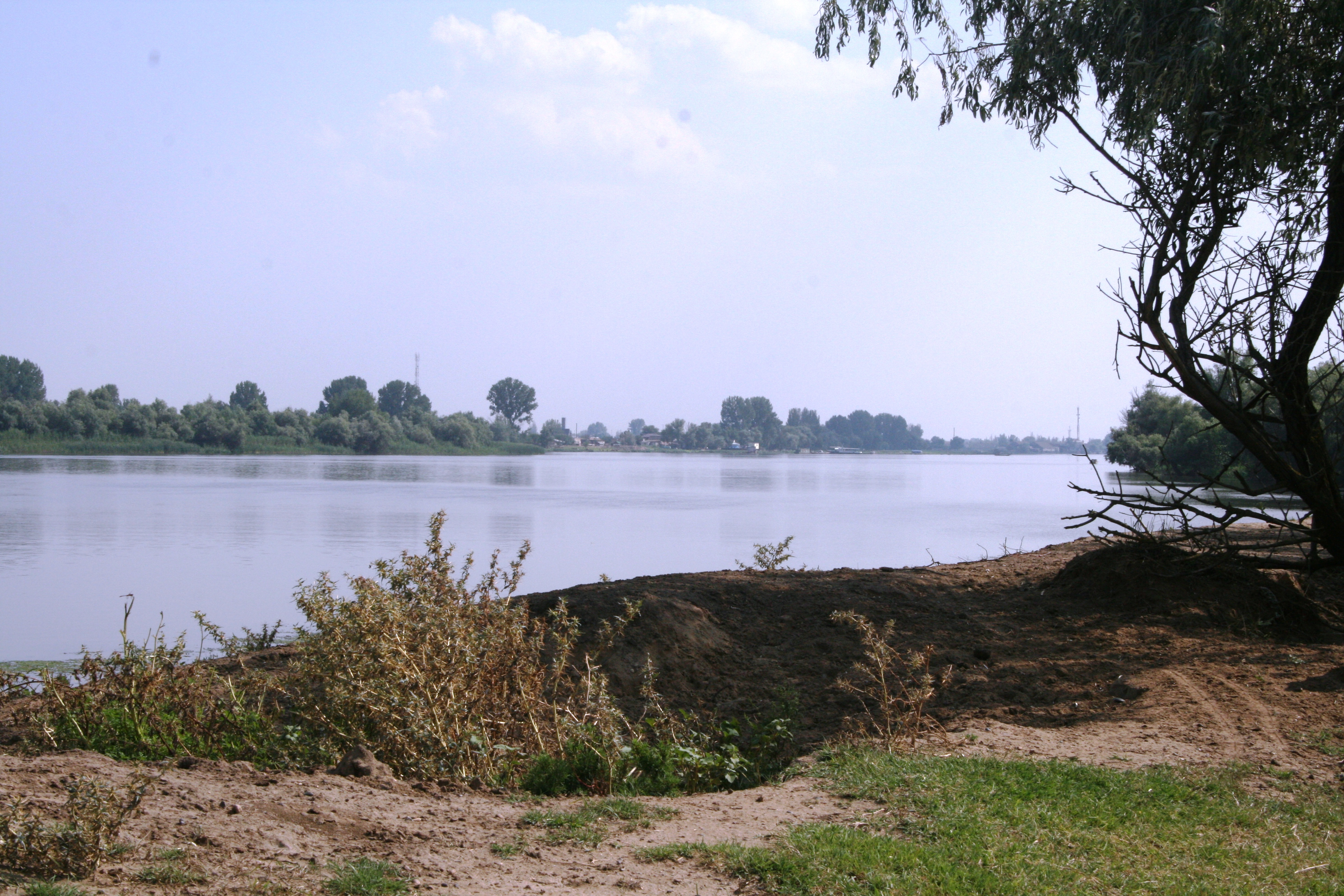 Кизань